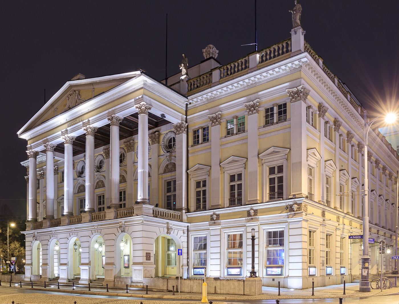 500px provided description: Opera we Wroc?awiu Zdj?cie do wykorzystania komercyjnego i niekomercyjnego. Prosimy o oznaczenie HRS Poland jako autora zdj?cia. Na przyk?ad: ?r?d?o: ?r?d?o: HRS Poland - Wroc?aw Please tag HRS Poland as a source. For example: Source: HRS Poland - Wroclaw [#city ,#night ,#poland ,#building ,#wroclaw ,#opera ,#wroc?aw ,#Lower Silesian Voivodeship]